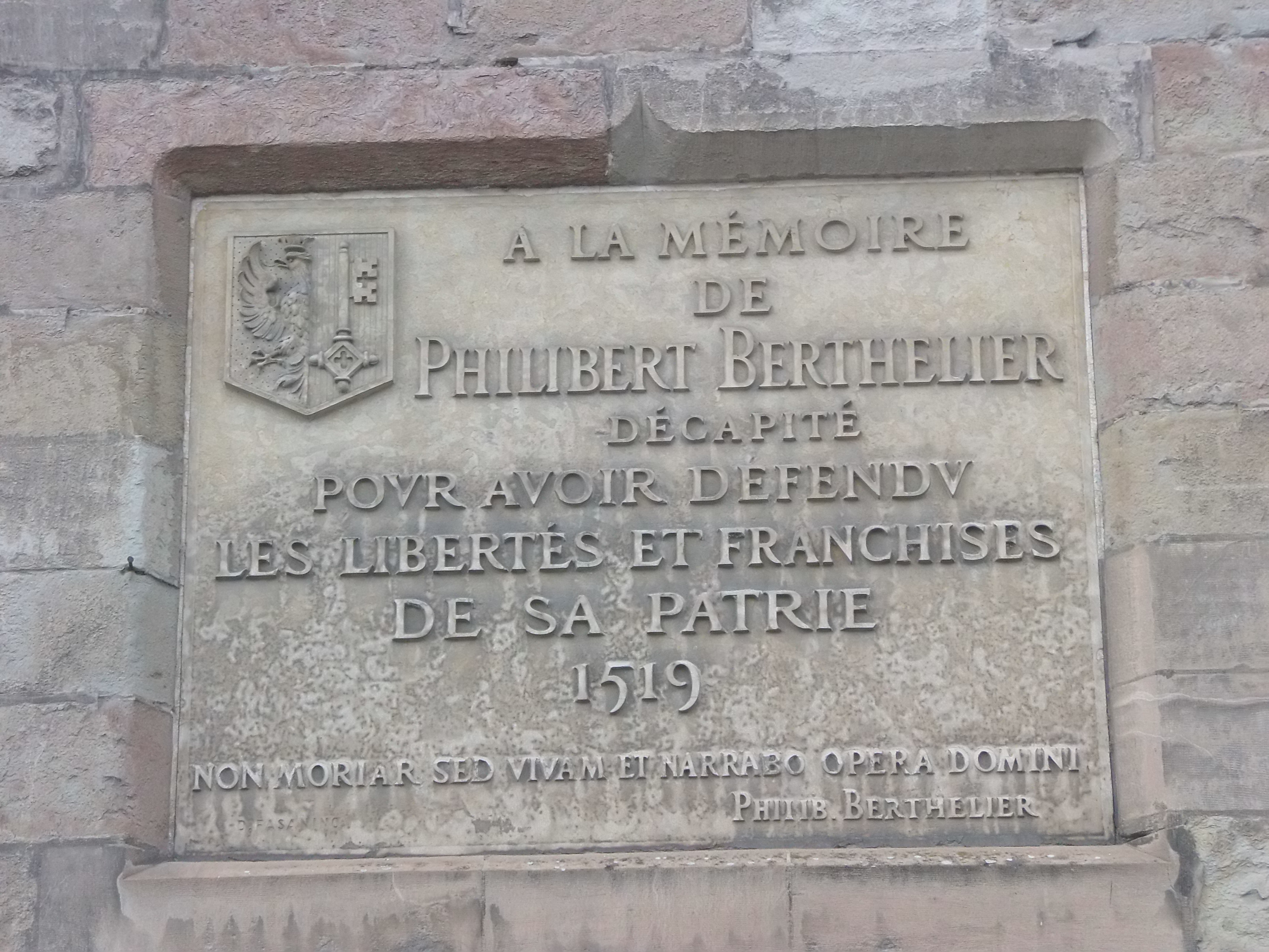 According to article 27 of the Copyright Act (en/de/fr/it), works installed at or on publicly accessible places or ground may be pictured, and such pictures may be offered for sale, sold, transmitted, or otherwise published. The image must not be three-dimensional and it must not be possible to use the picture for the same purpose as the original. The works must be permanently installed, but for the purposes of the law, "permanent" means a fixed installation which may be temporary -- time limited -- but not "accidental", e.g. due to transport of the work. Philibert Berthelier -- Tour de l'Île (Genève)